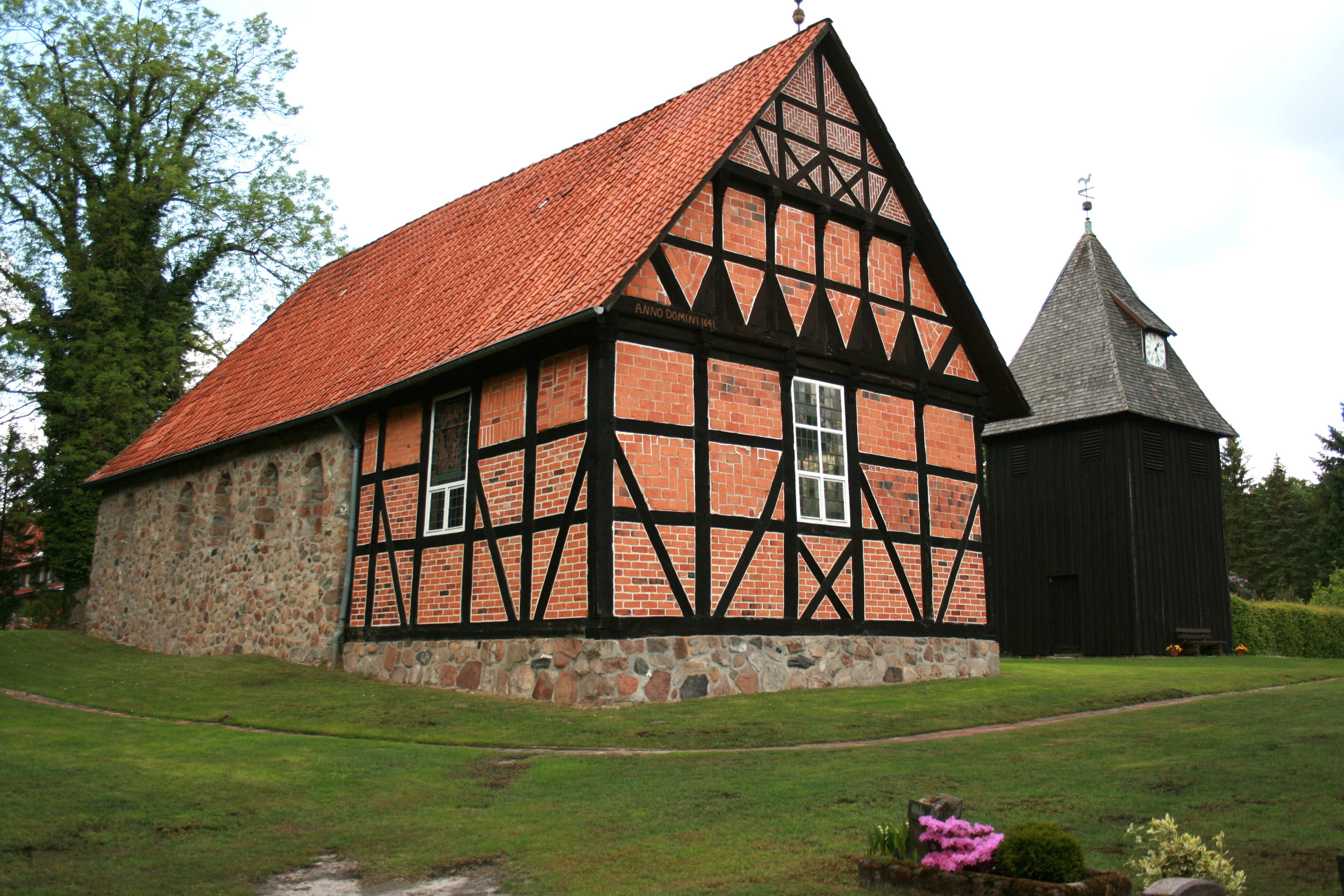 St. Magdalenen in Undeloh